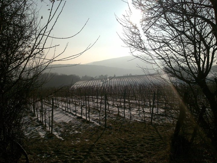 Das Bild zeigt einen Teil vom Maurer Berg in Blickrichtung Kalksburg. Im Hintergrund der Zugberg.